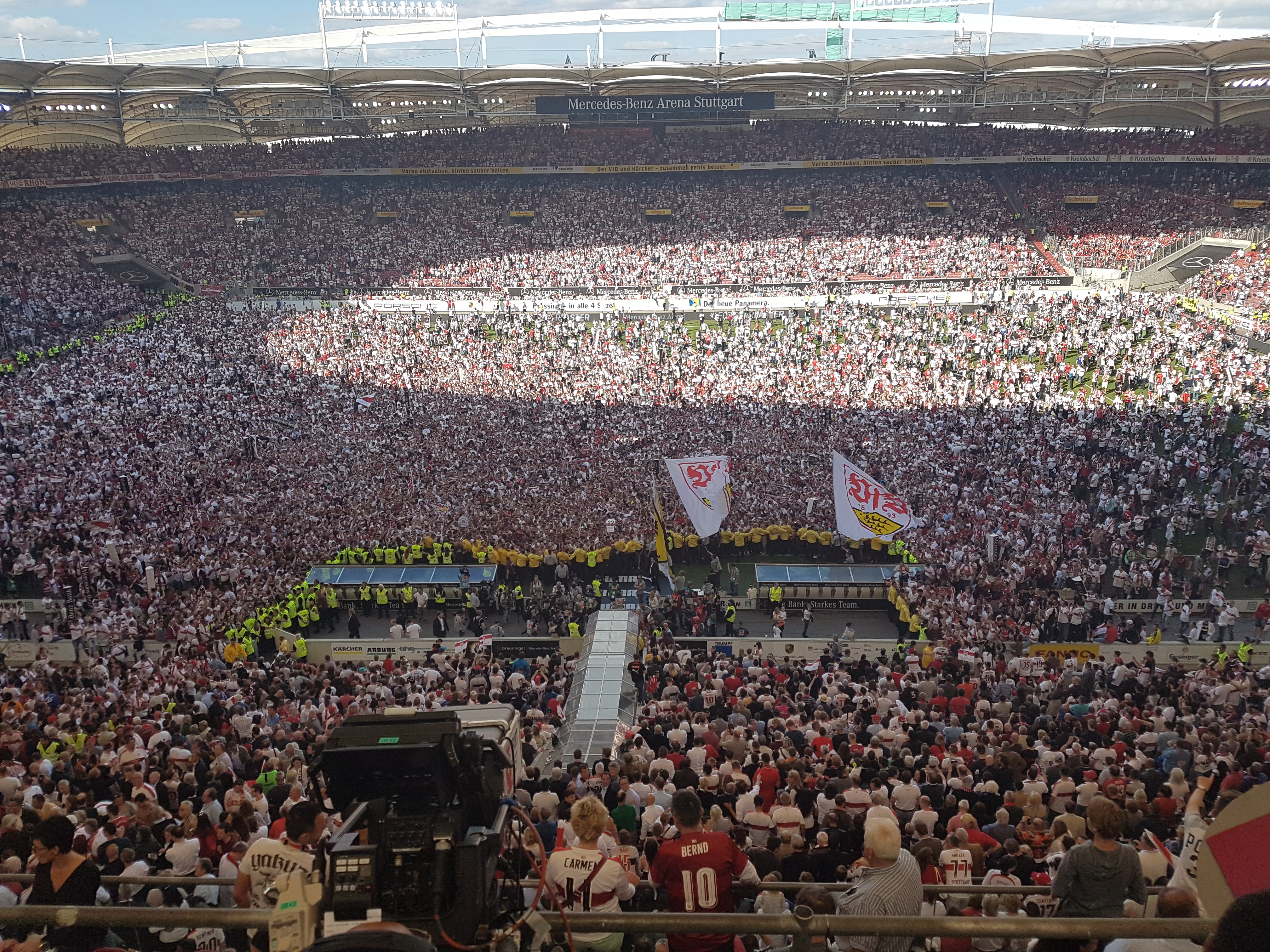 Platzsturm der VfB Fans nach der 2.Ligameisterschaft am 34. Spieltag der Saison 2016-2017 in der Mercedes-Benz-Arena